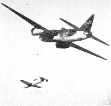 Mitsubishi G4M2E Model 24 Tei bomber just released MXY7 Ohka. Wind tunnel model experiment